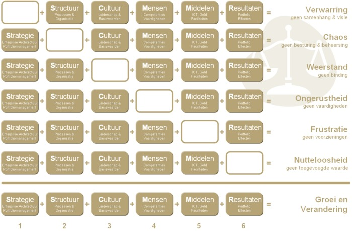 Managementmodellen. Strategie + Structuur + Cultuur + Mensen + Middellen + Resultaten = Groei en Verandering